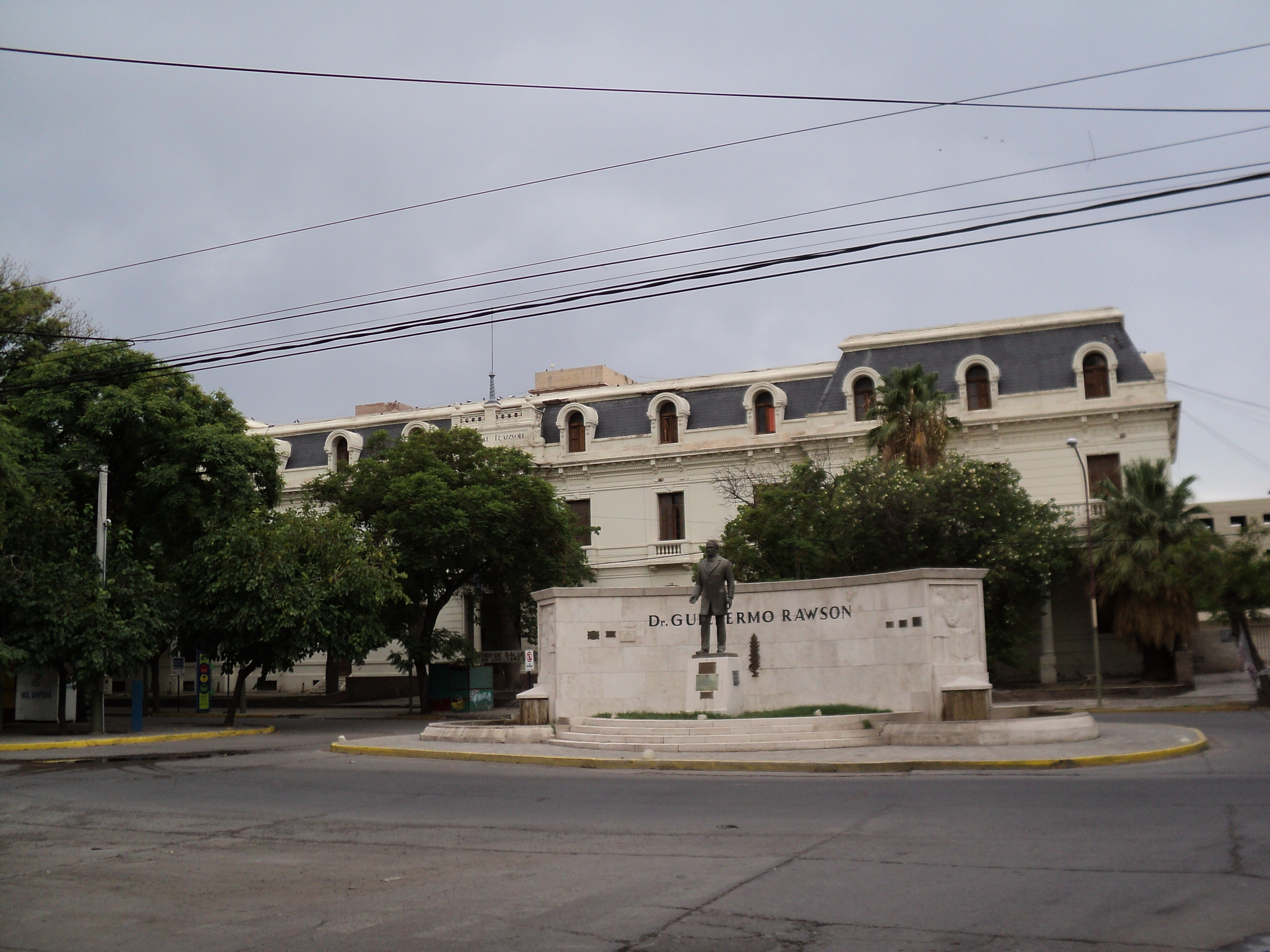 hospital Rawson en su edificio tradicional, de fondO el nuevo edificio de 3 pisos